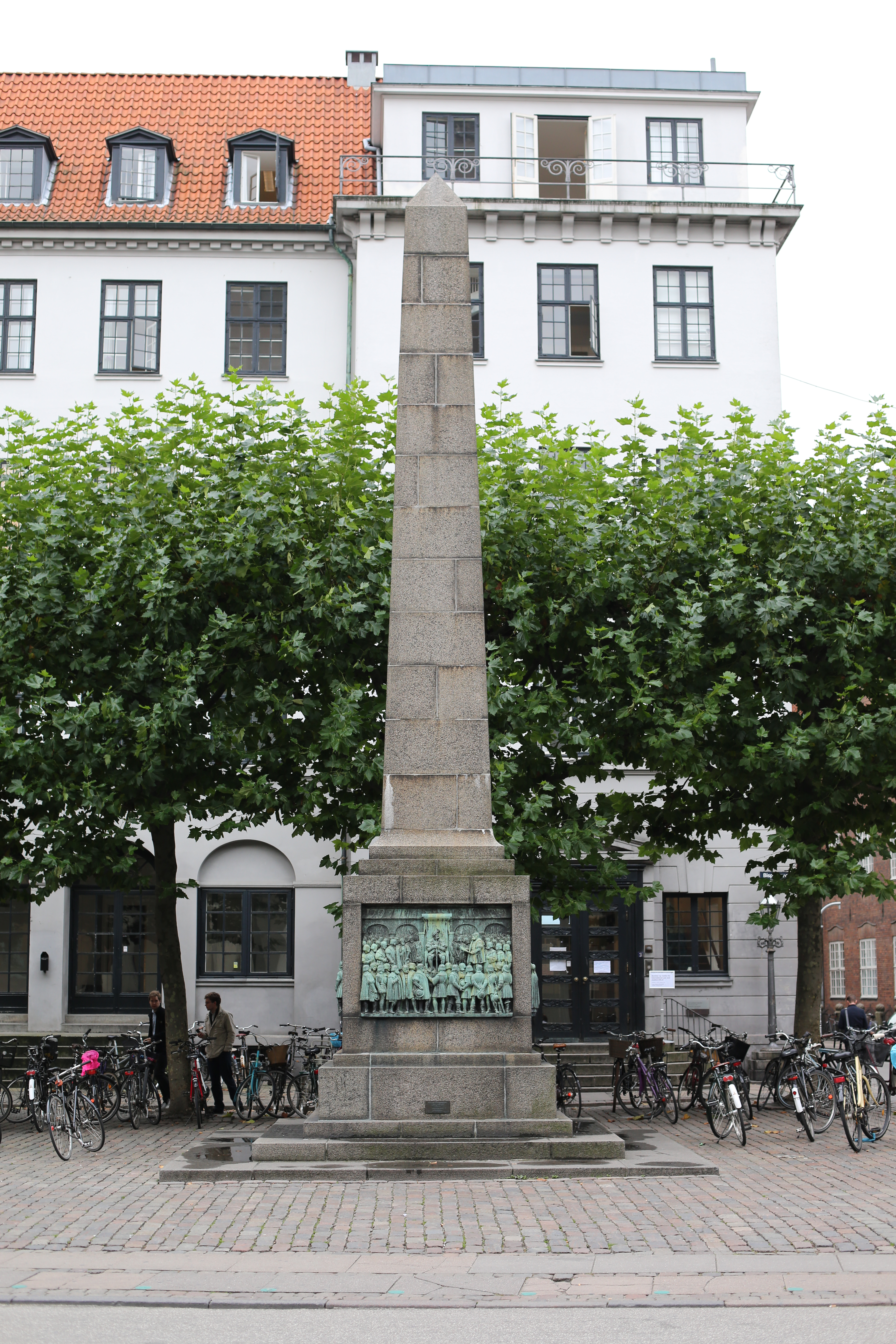 Studentersamfundet's Building on Bispetorv in Copenhagen, Denmark